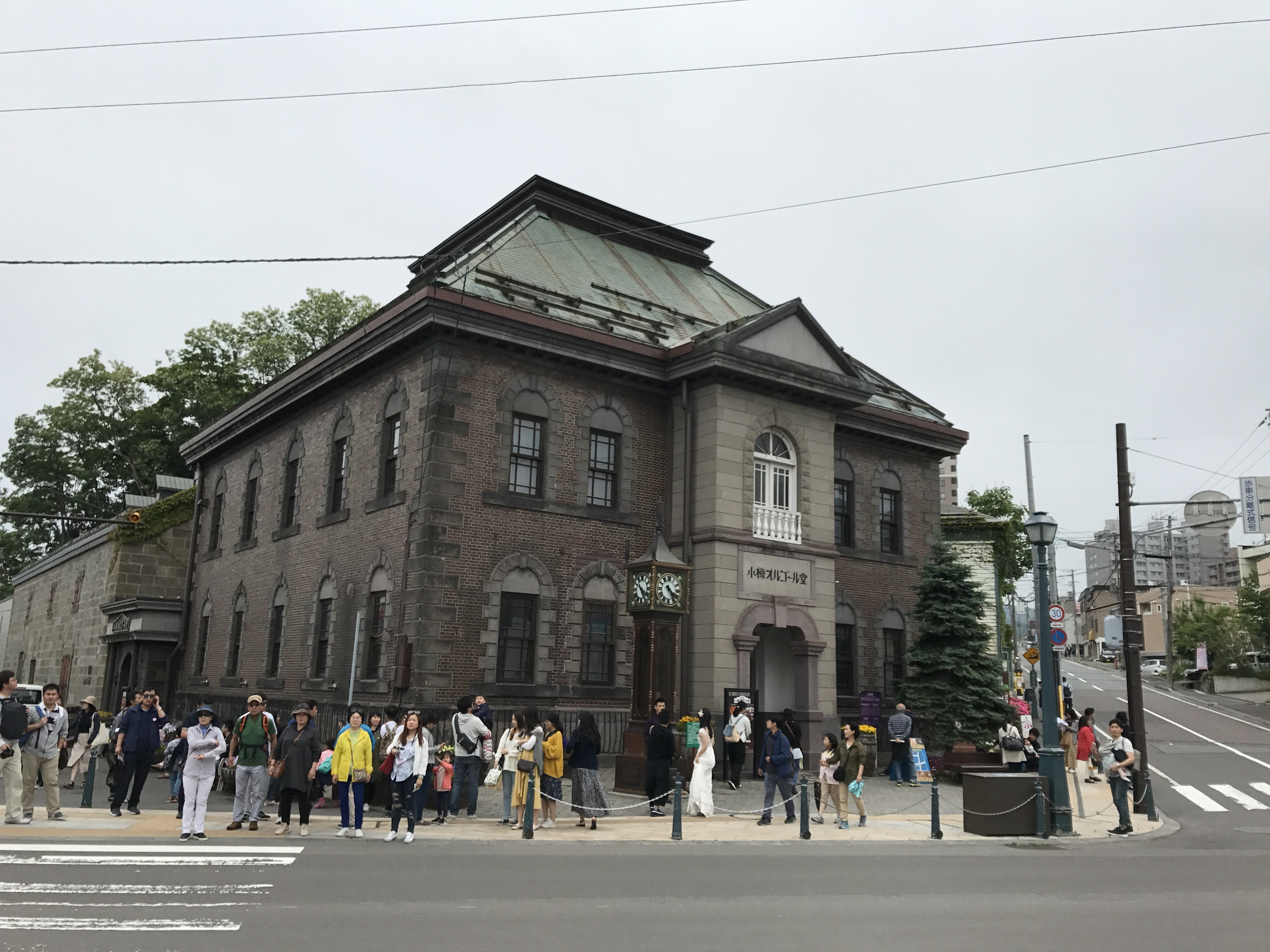 오타루 오르골당 본당의 모습